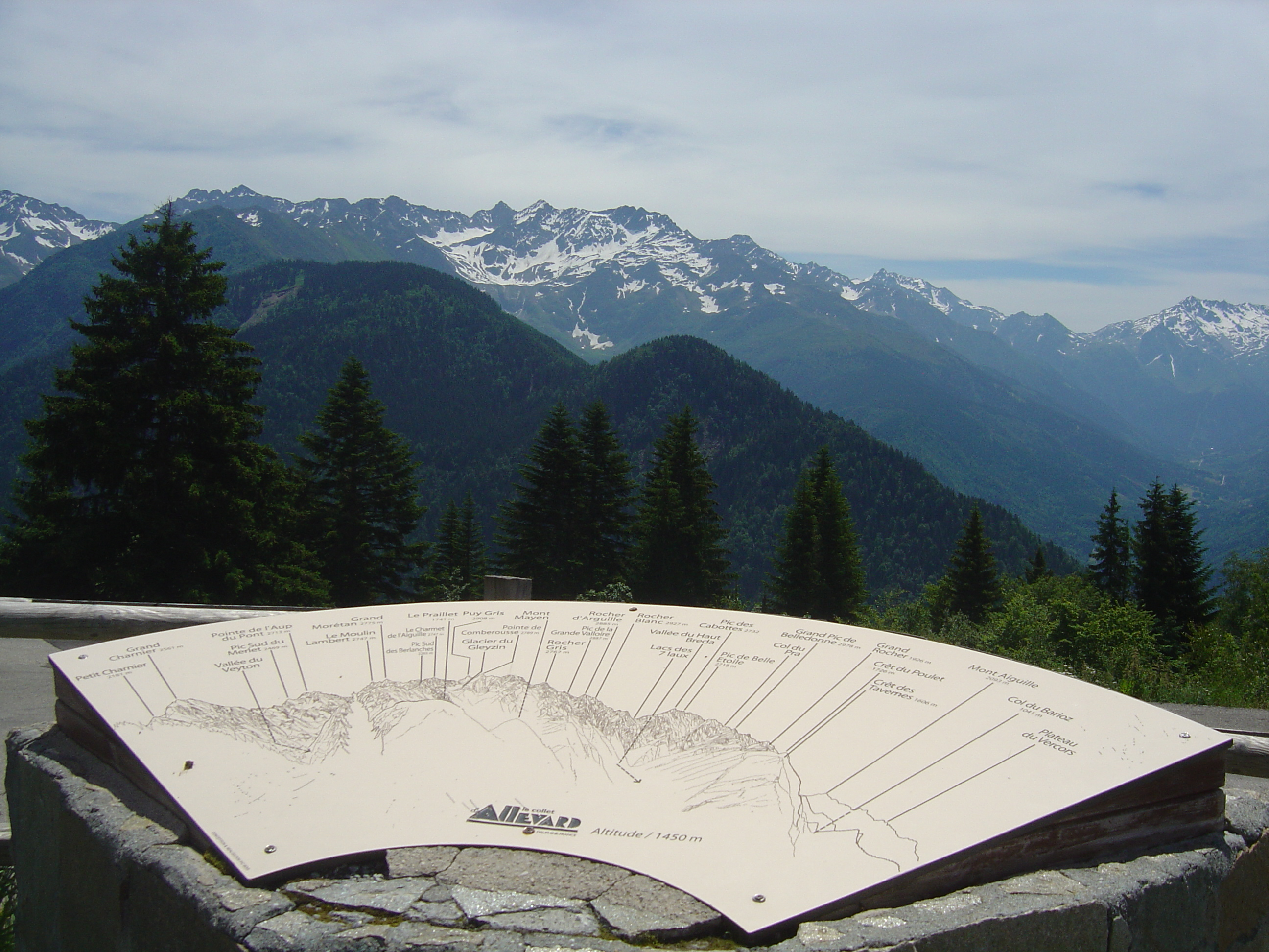 Table d'orientation dans la station du Collet d'Allevard (1450m). Vue sur le massif de Belledonne.